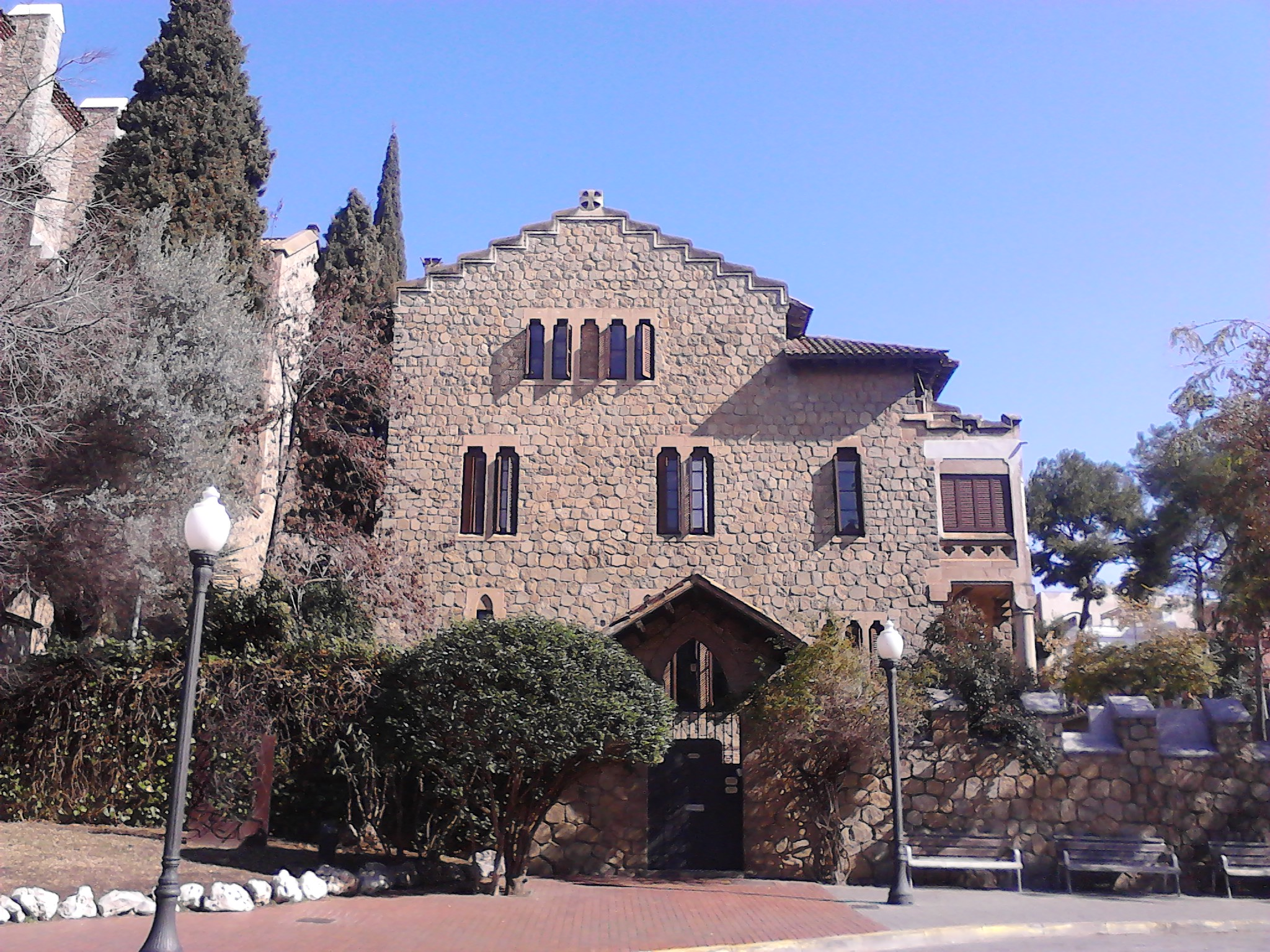 Casa rectoral (Santa Coloma de Gramenet)